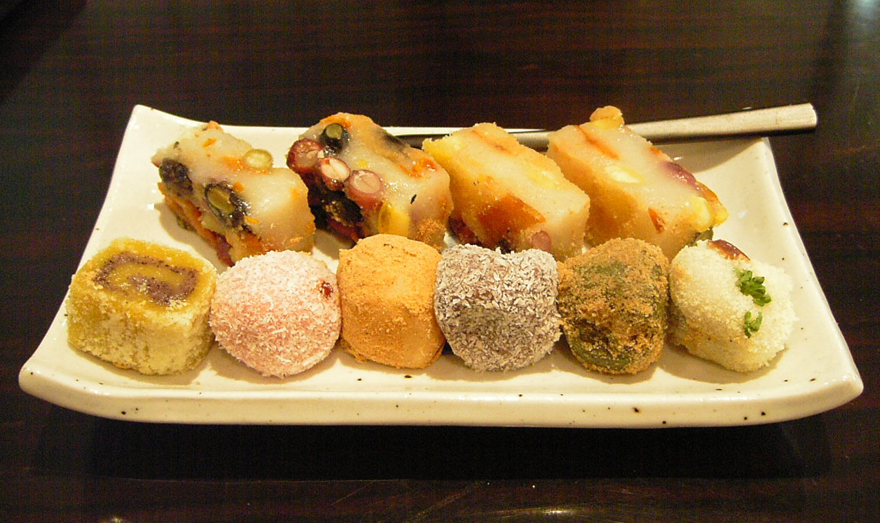 Tteok (떡)